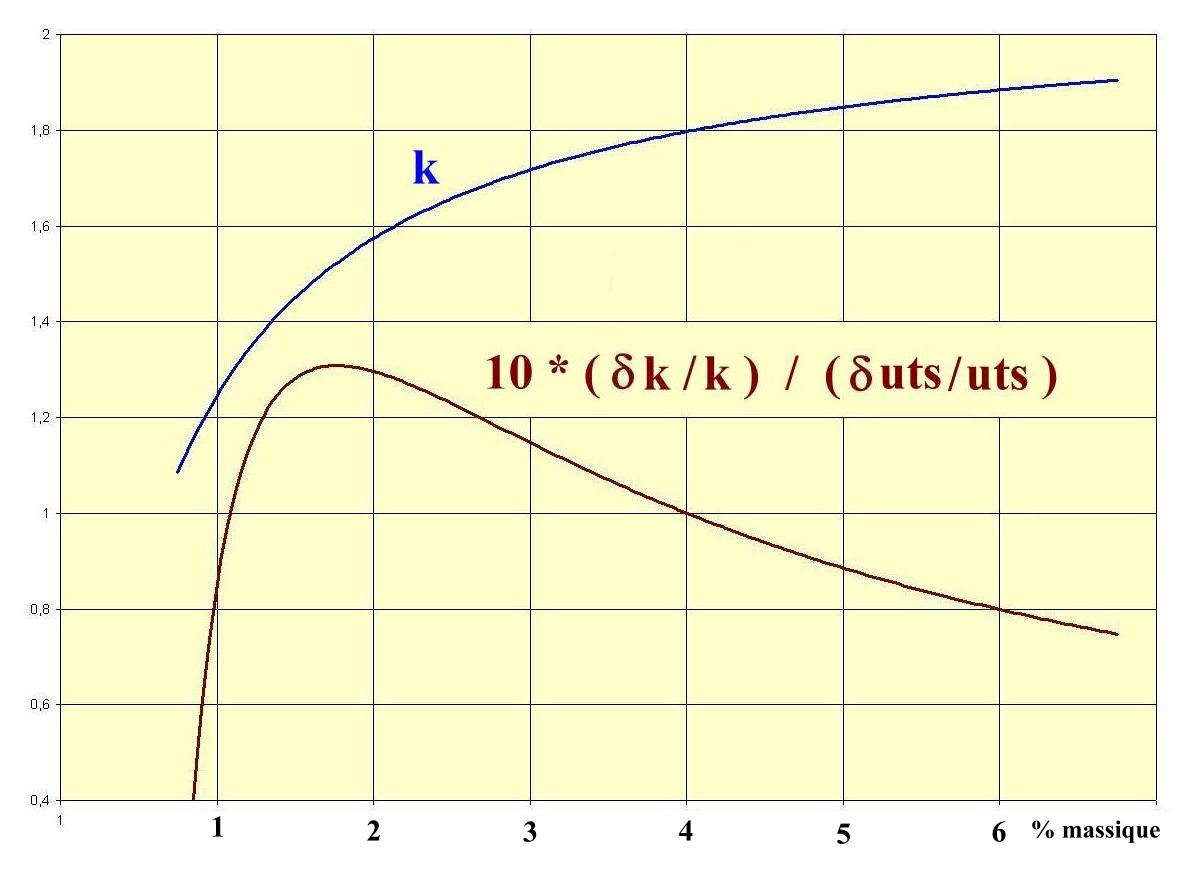 Français cadien: Courbe montrant l'évolution de k infini en fonction de l'enrichissement et de la quantité d' UTS nécessaire à partir de l'uranium naturel avec un enrichissement de rebut de 0,2%.